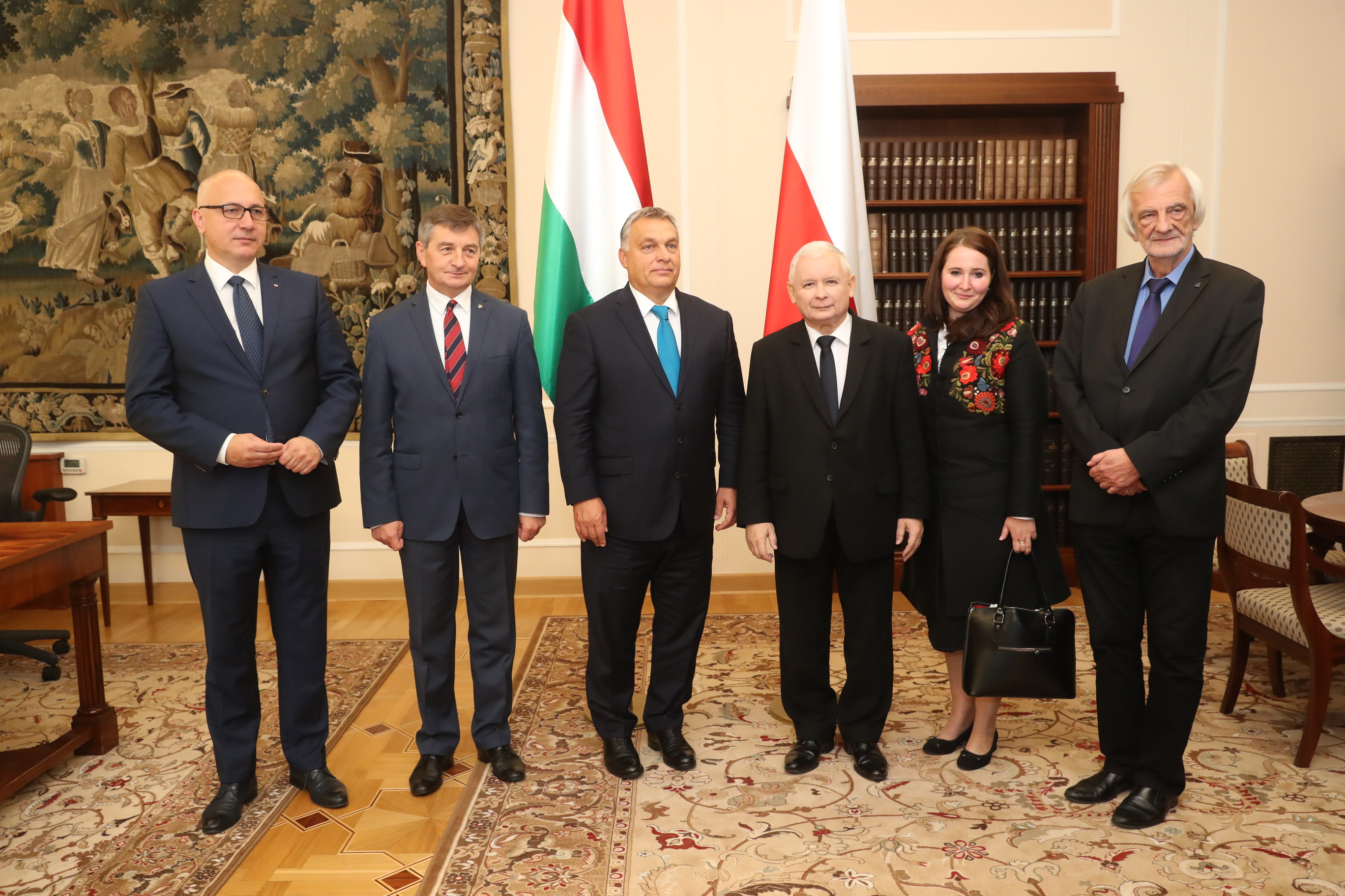 Jarosław Kaczyński i Viktor Orbán, ambasador Węgier Orsolya Zsuzsanna Kovács w Sejmie RP z marszałkami Sejmu. Viktor Orbán w Sejmie.